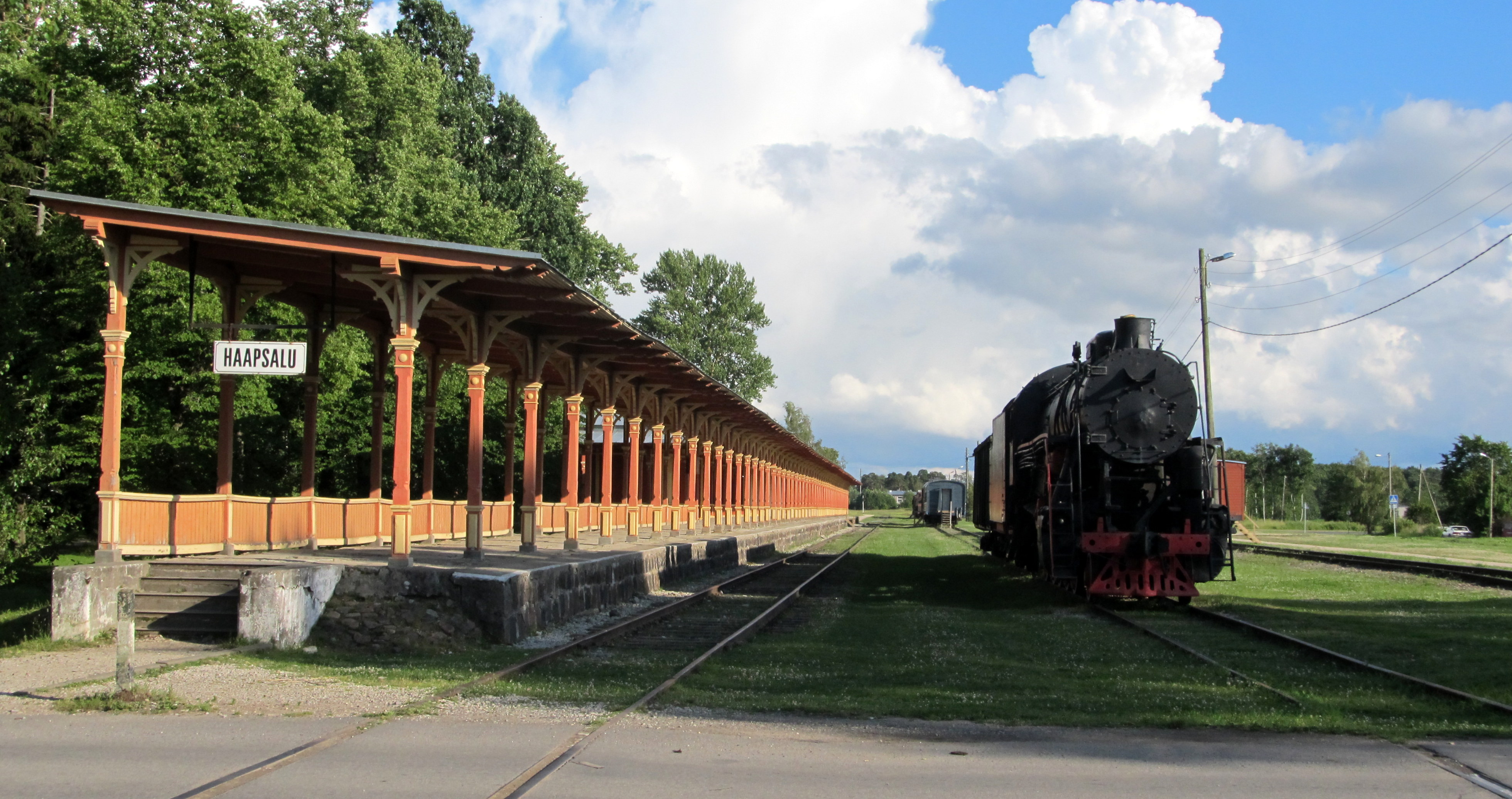 Haapsalu raudteejaama perroon